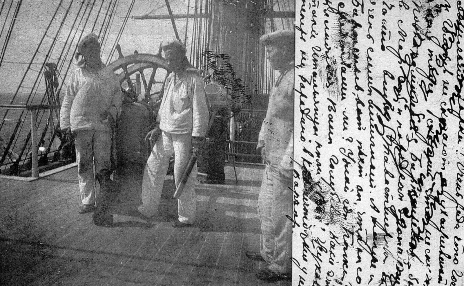 На палубе броненосного фрегата «Князь Пожарский».